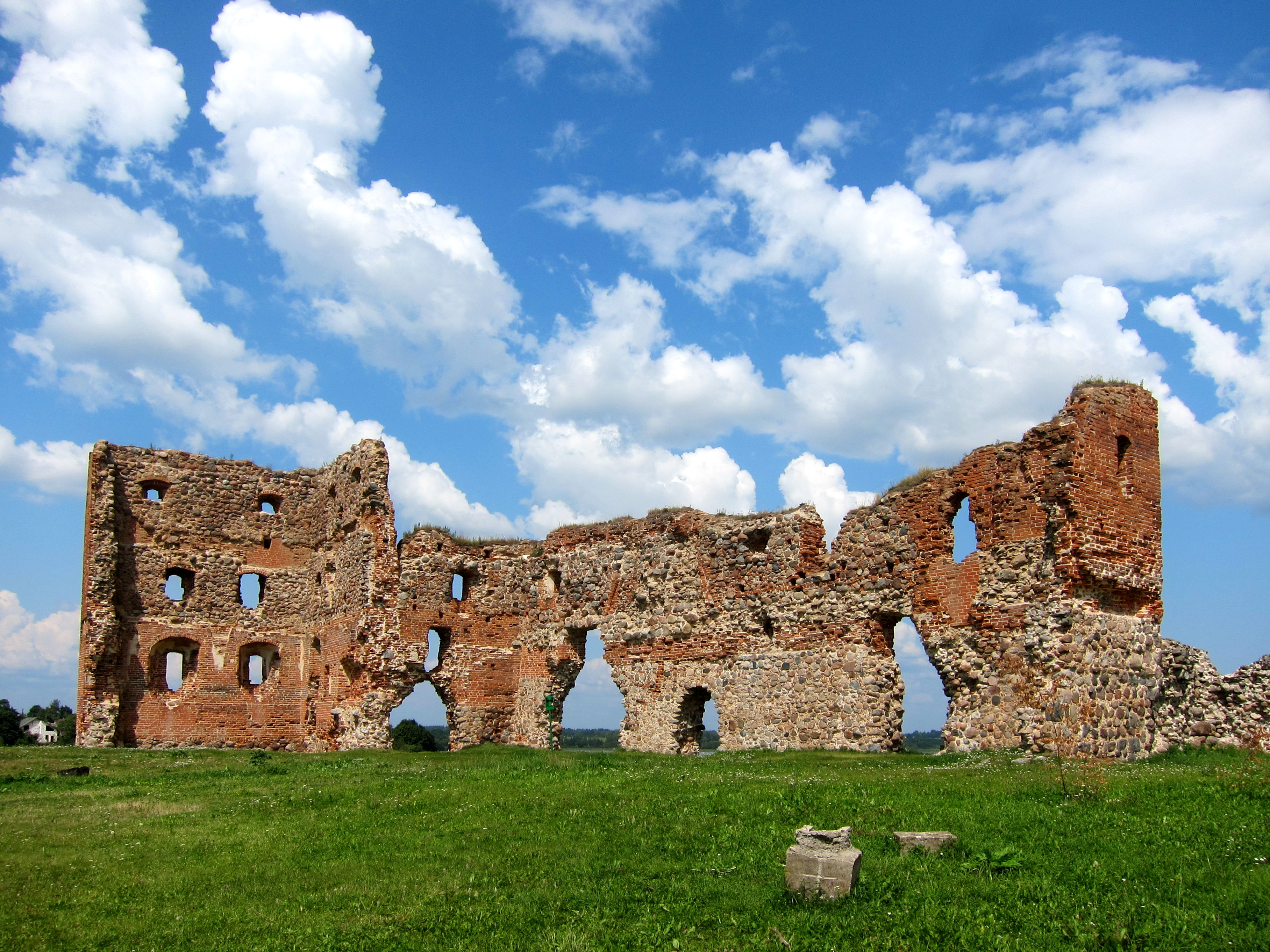 Ludzas pilsdrupas, Ludza